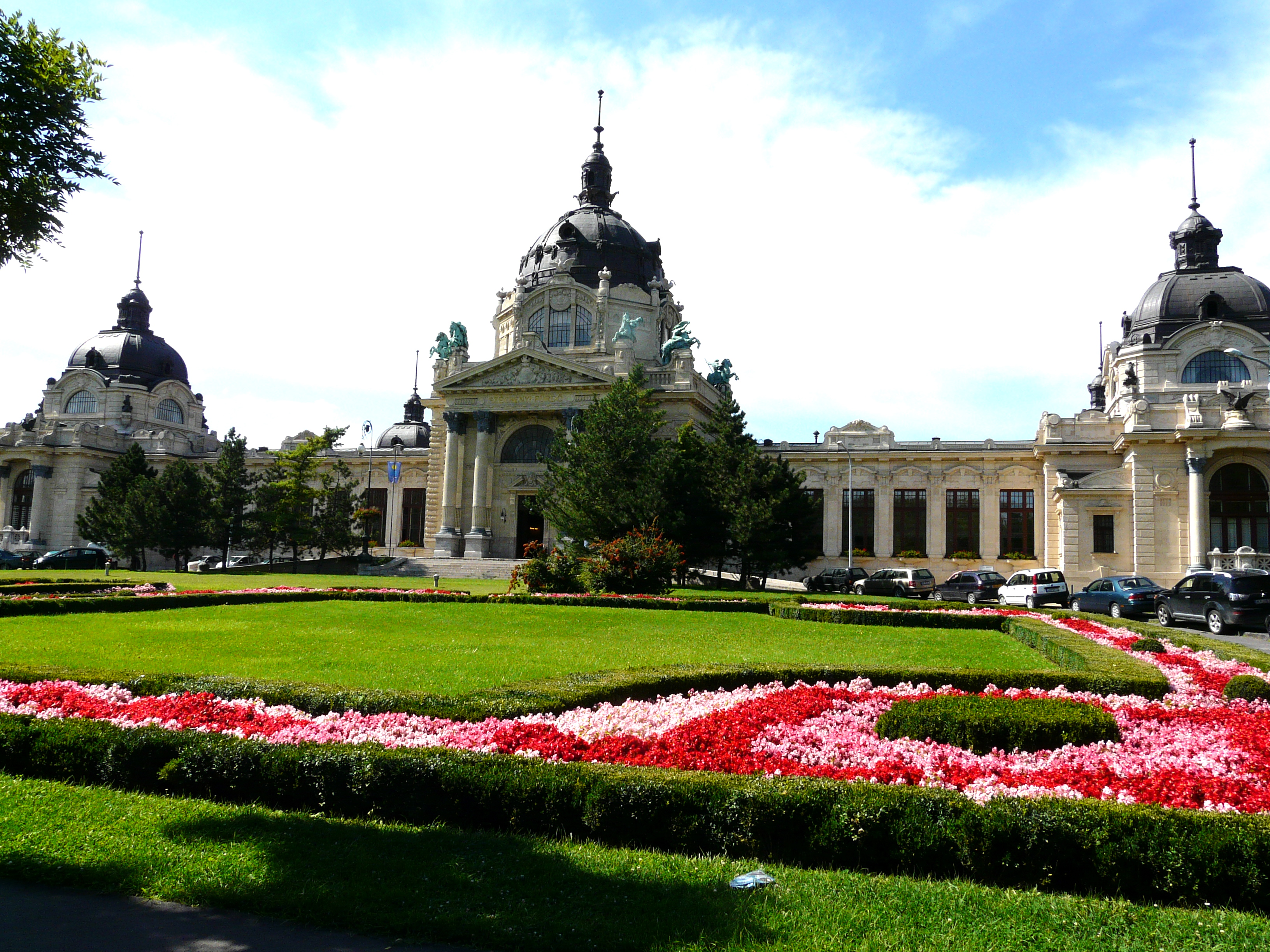 Budapest -Széchenyi fürdő